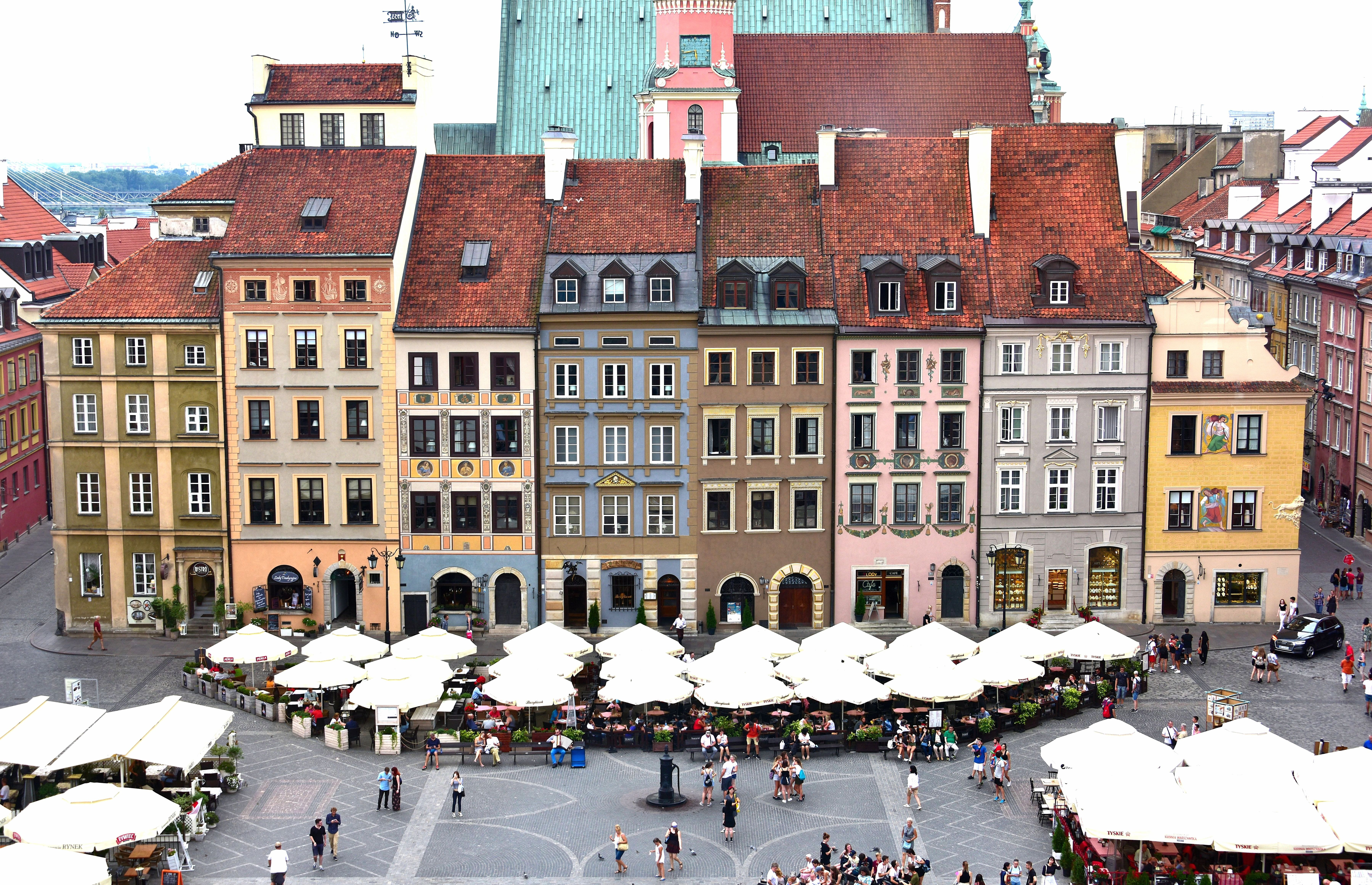 Rynek Starego Miasta w Warszawie, strona Zakrzewskiego